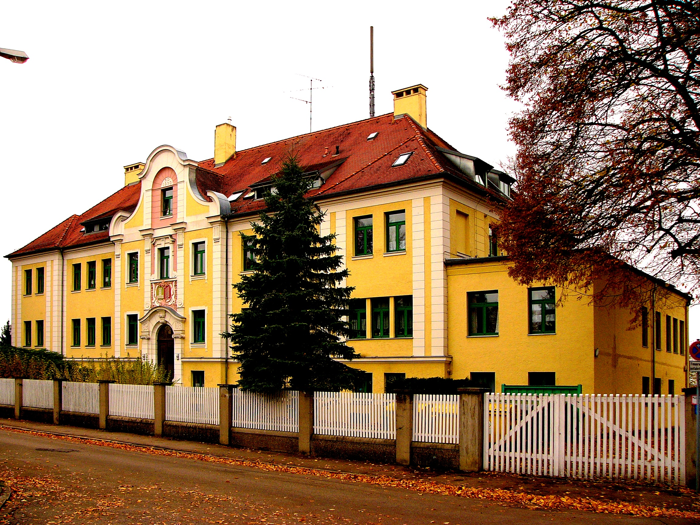 Ehemaliges Krankenhaus Göggingen; zweigeschossiger Walmdachbau über hohem Sockelgeschoss, mit Eckrisaliten und übergiebeltem Mittelrisalit, Neubarock, bez. 1903; Zugehöriger Park.This is a photograph of an architectural monument.